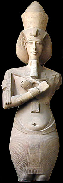 Colosse osiriaque représentant Aménophis IV - Akhenaton et provenant de Karnak.